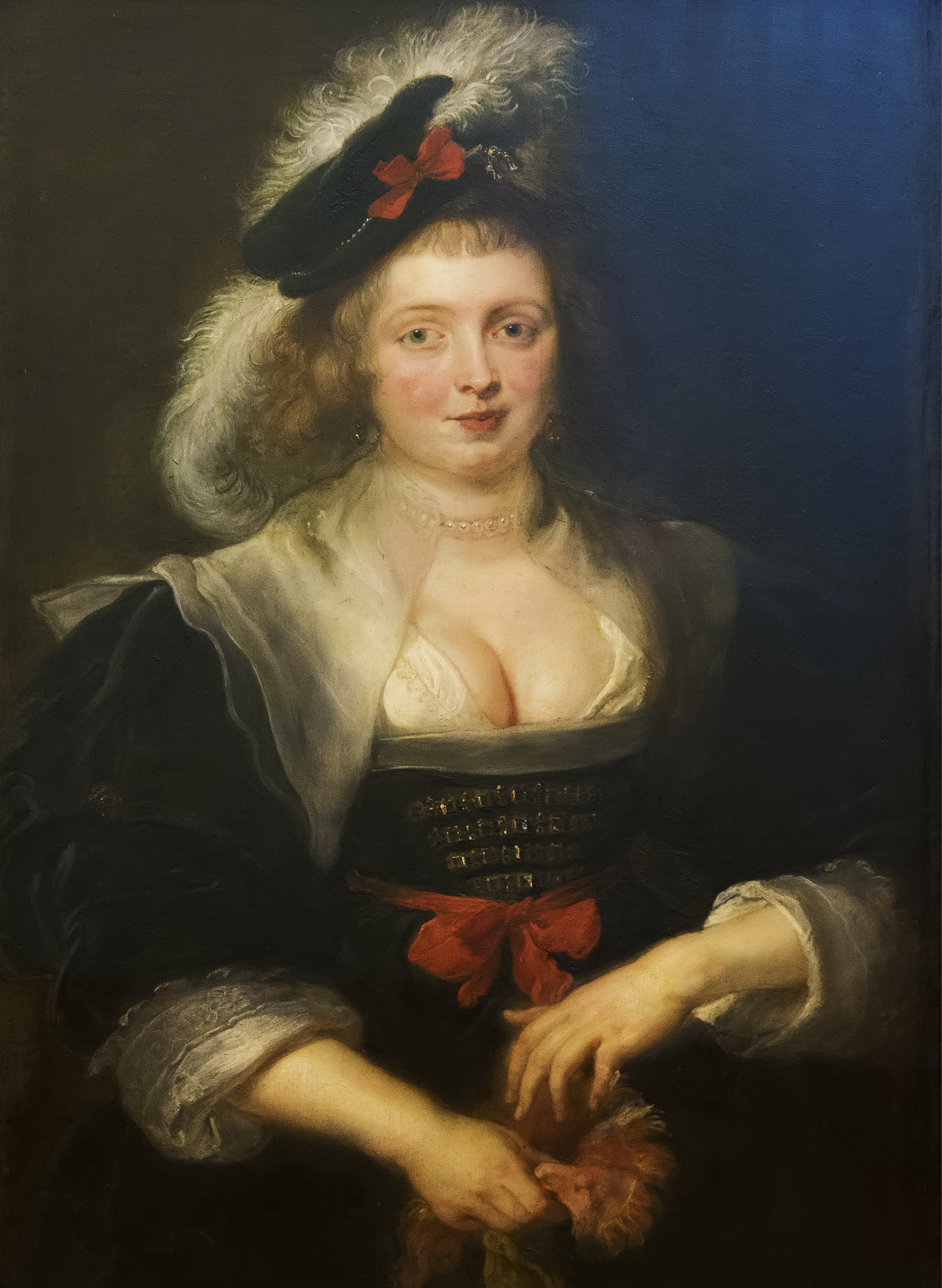 Peter Paul Rubens (1577-1640) Hélène Fourment met handschoen - Alte Pinakothek